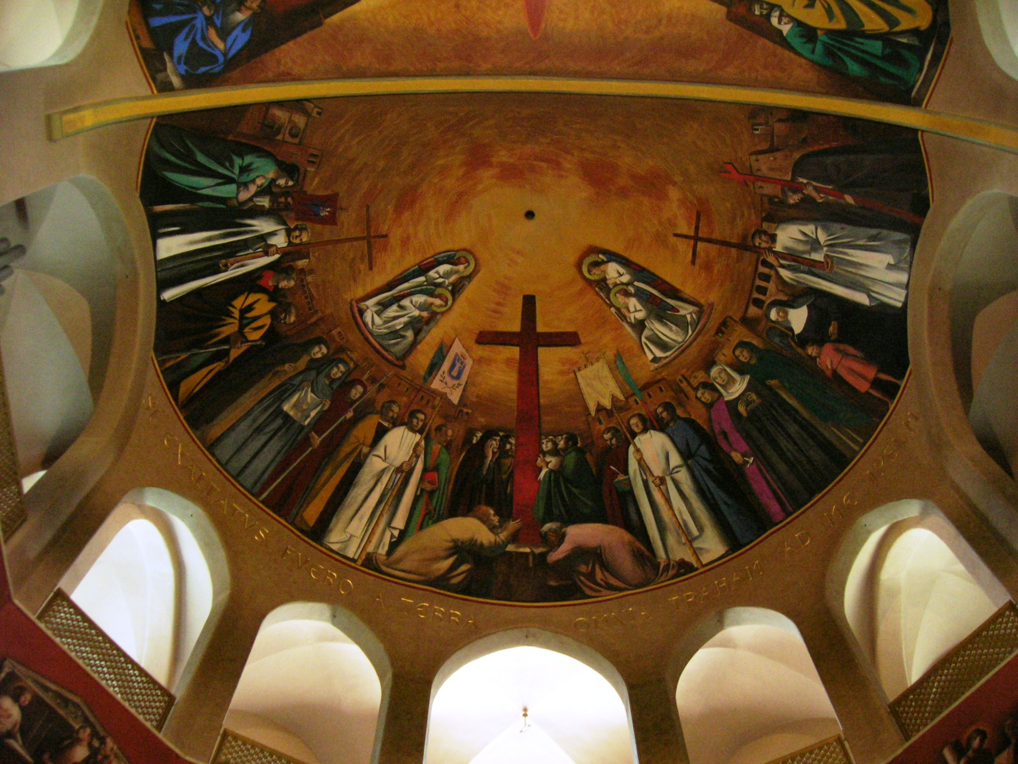 La basilica di Santa Rita a Cascia